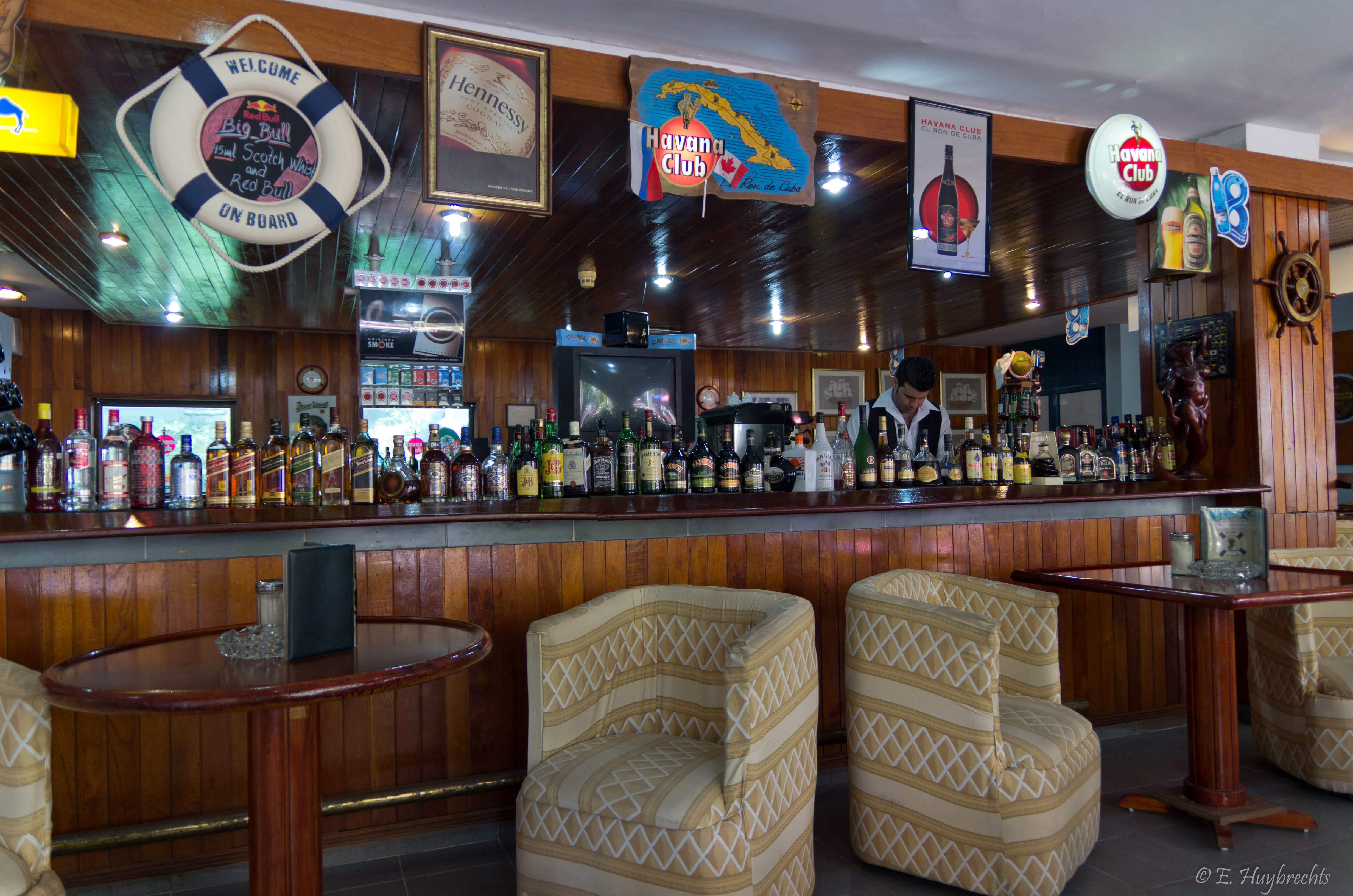 22 juillet 2011 (K5_02667)